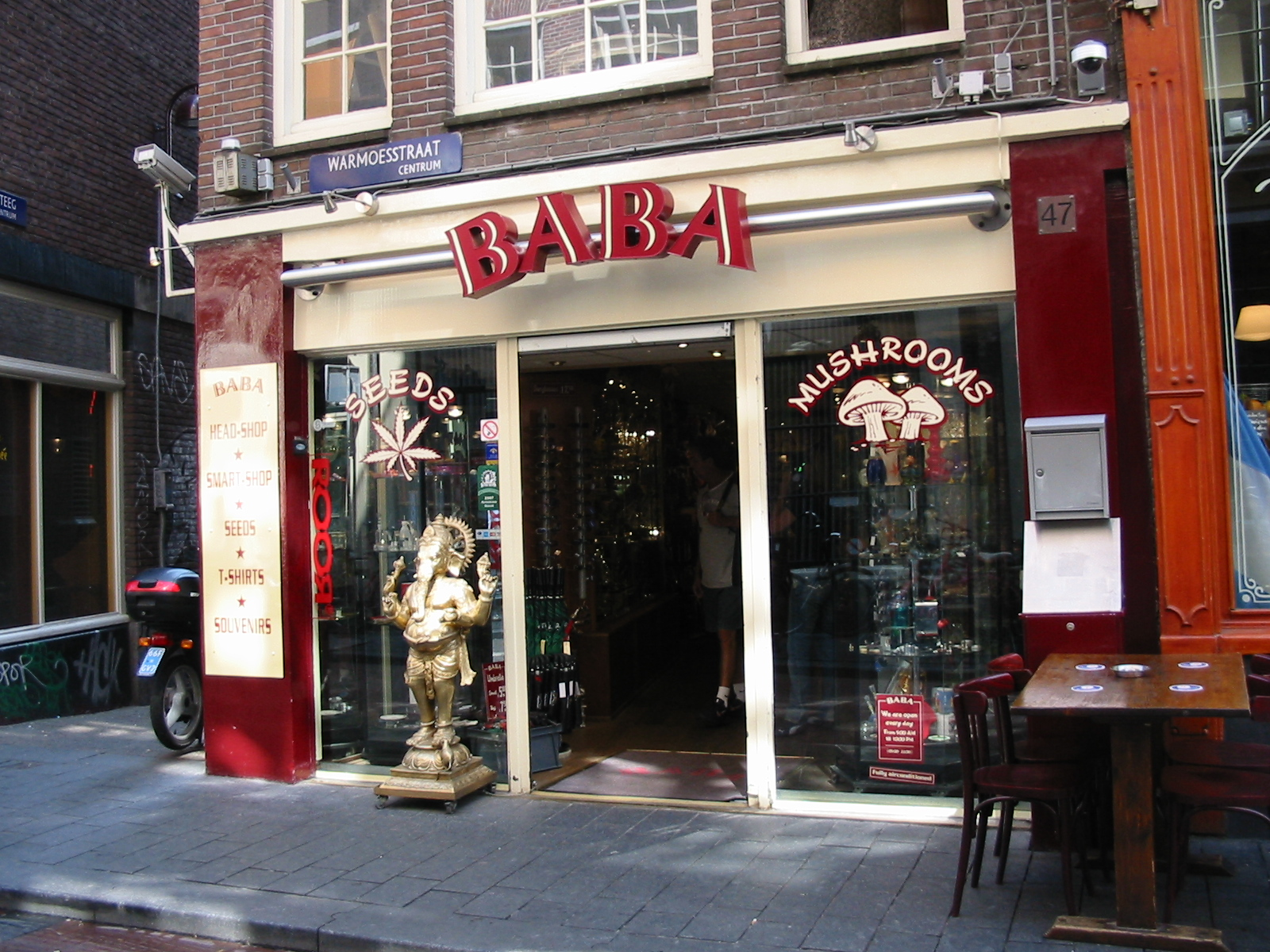 Paddo_shop_warmoesstraat_Amsterdam